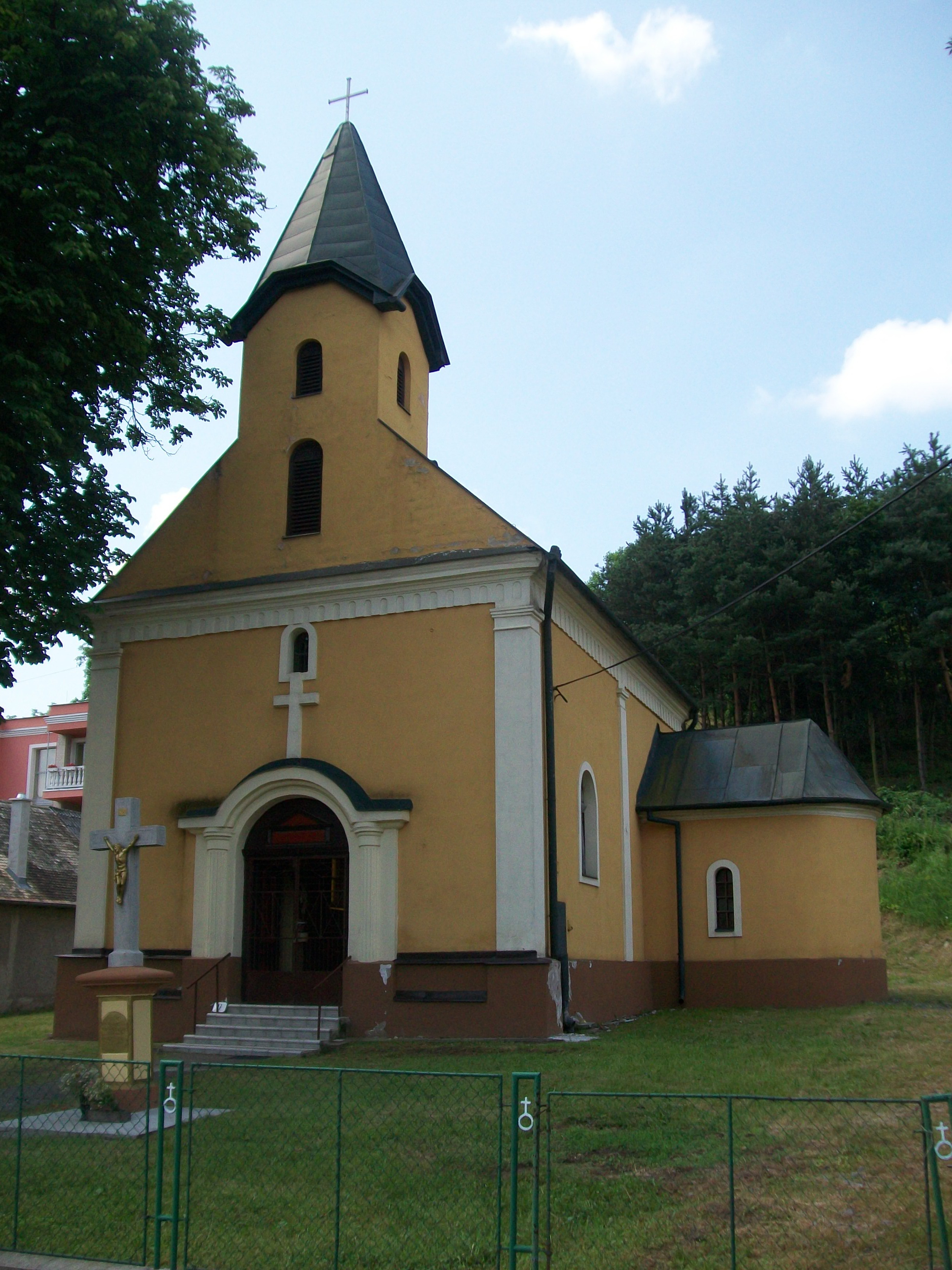 Rímskokatolícky Kostol Mena Panny Márie v obci Šíd